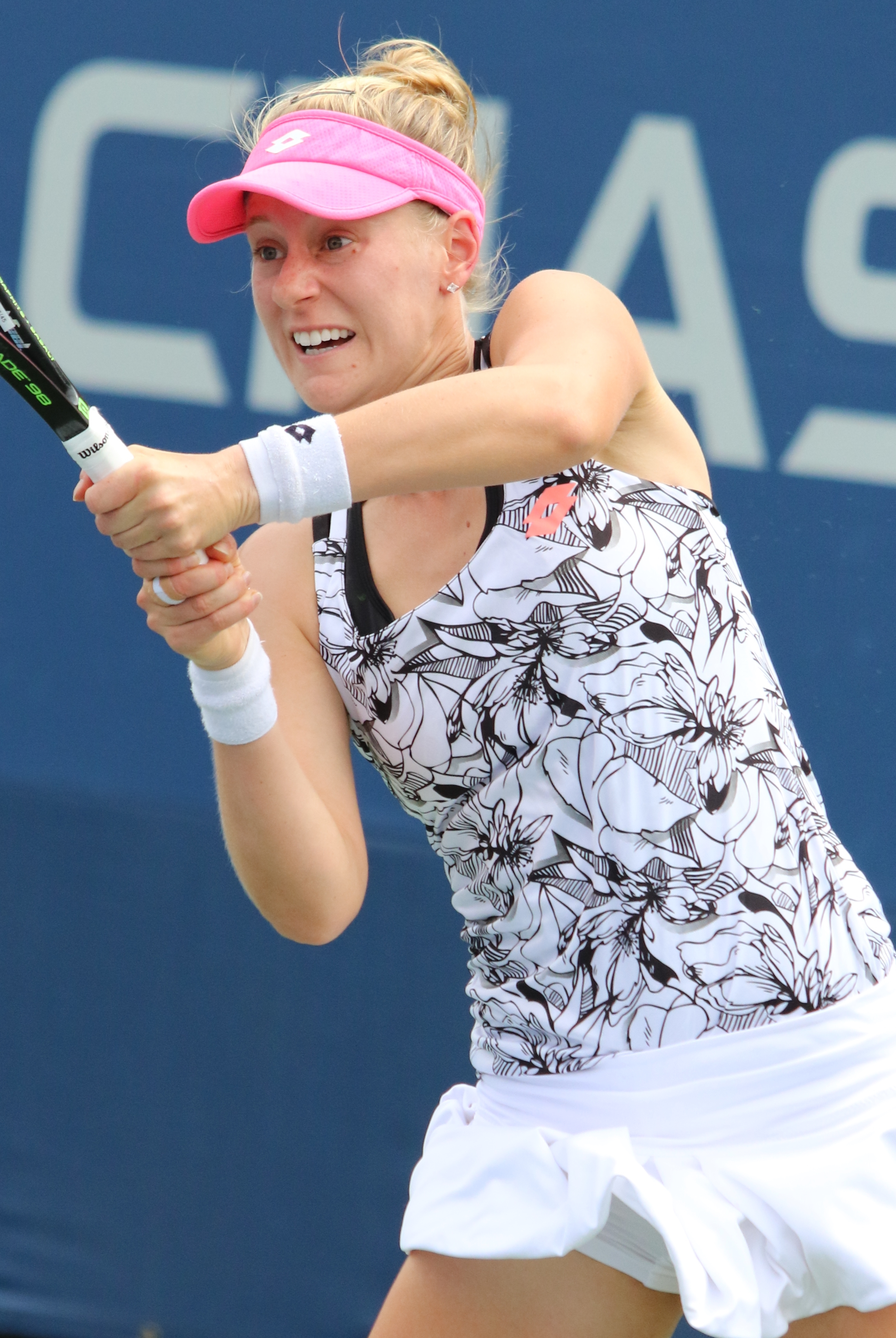 Riske US16 (5)